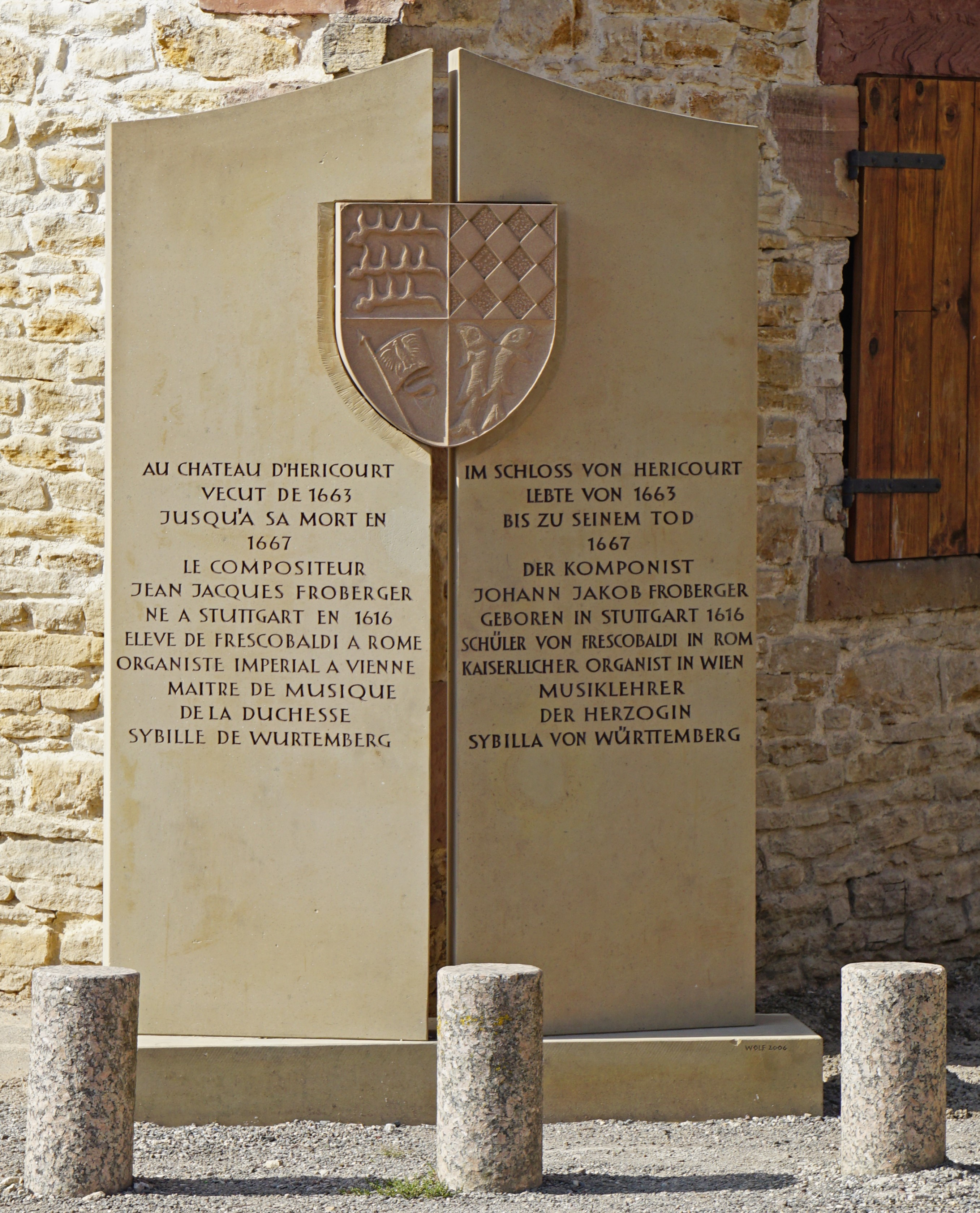 La plaque en hommage à Johann Jakob Froberger au château d'Héricourt.